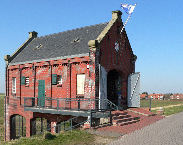 Alter Rettungsbootschuppen in Harlesiel/Carolinensiel